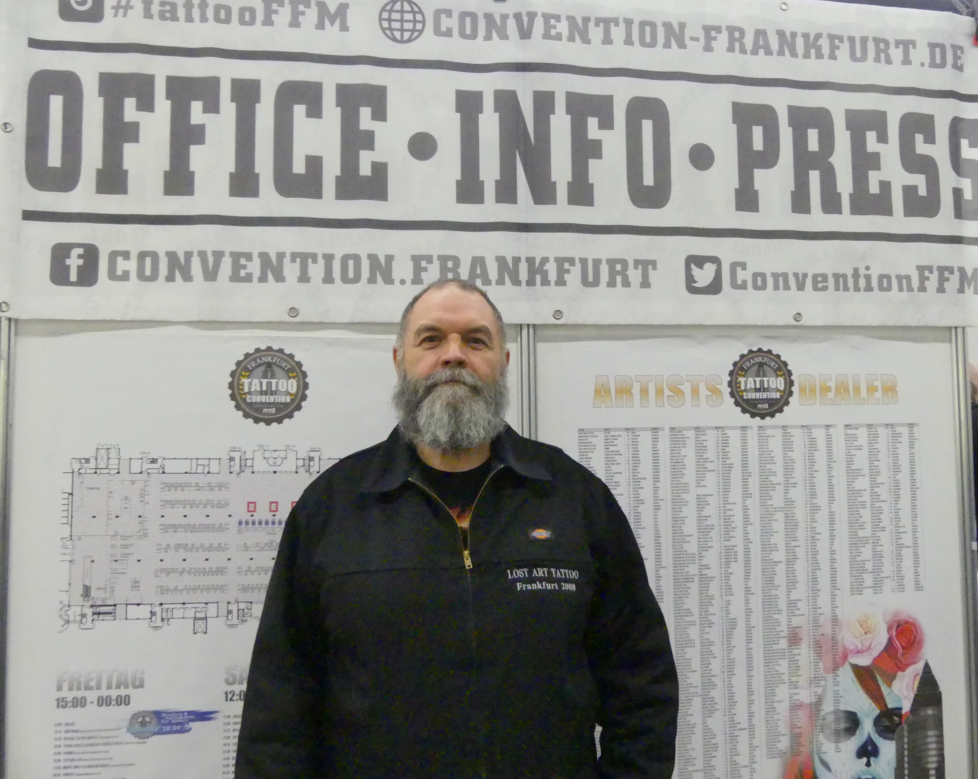 Der Tätowierer und Veranstalter Tommy Köhler (1993-2019 Veranstalter der Tattoo Convention Frankfurt) auf der 27. Convention in Frankfurt 2019